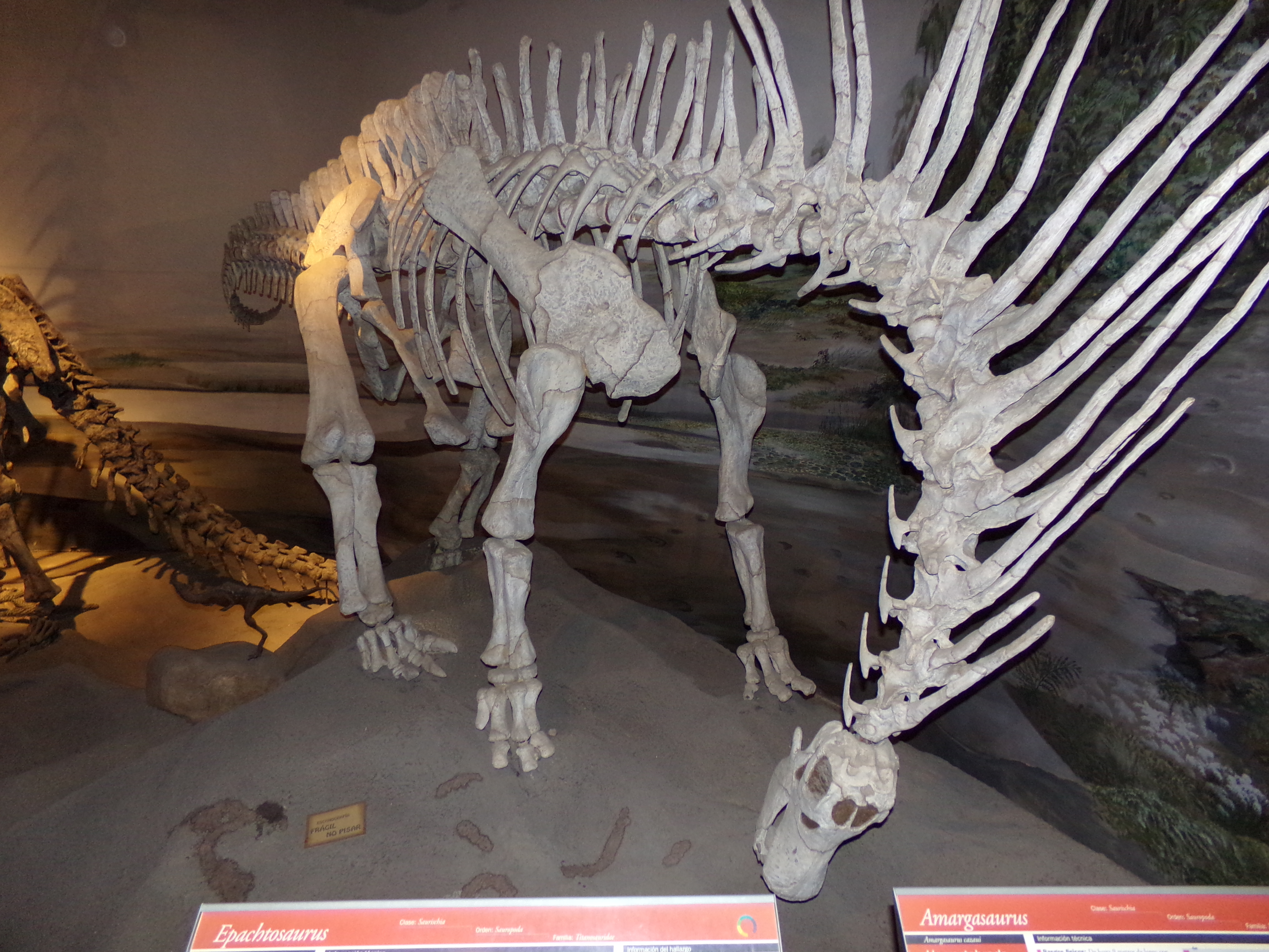 Amargasaurus, Museo Paleontológico Egidio Feruglio, Trelew.